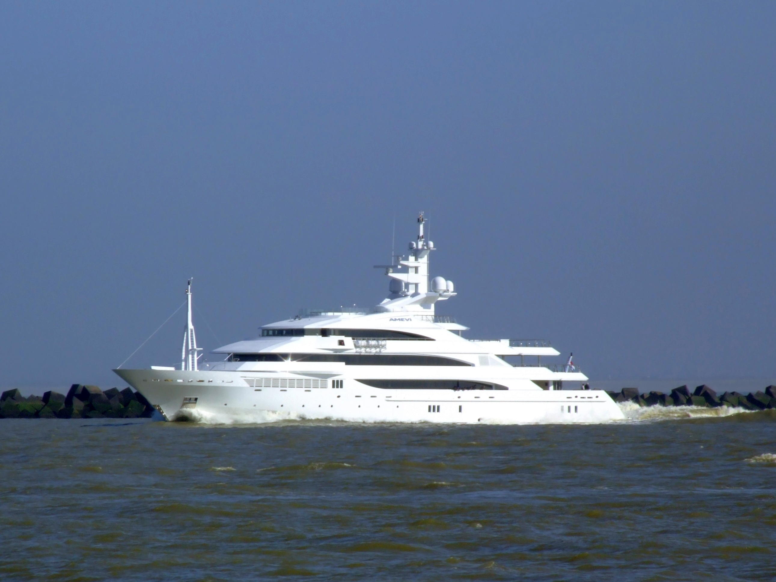 Amevi leaving Rotterdam.